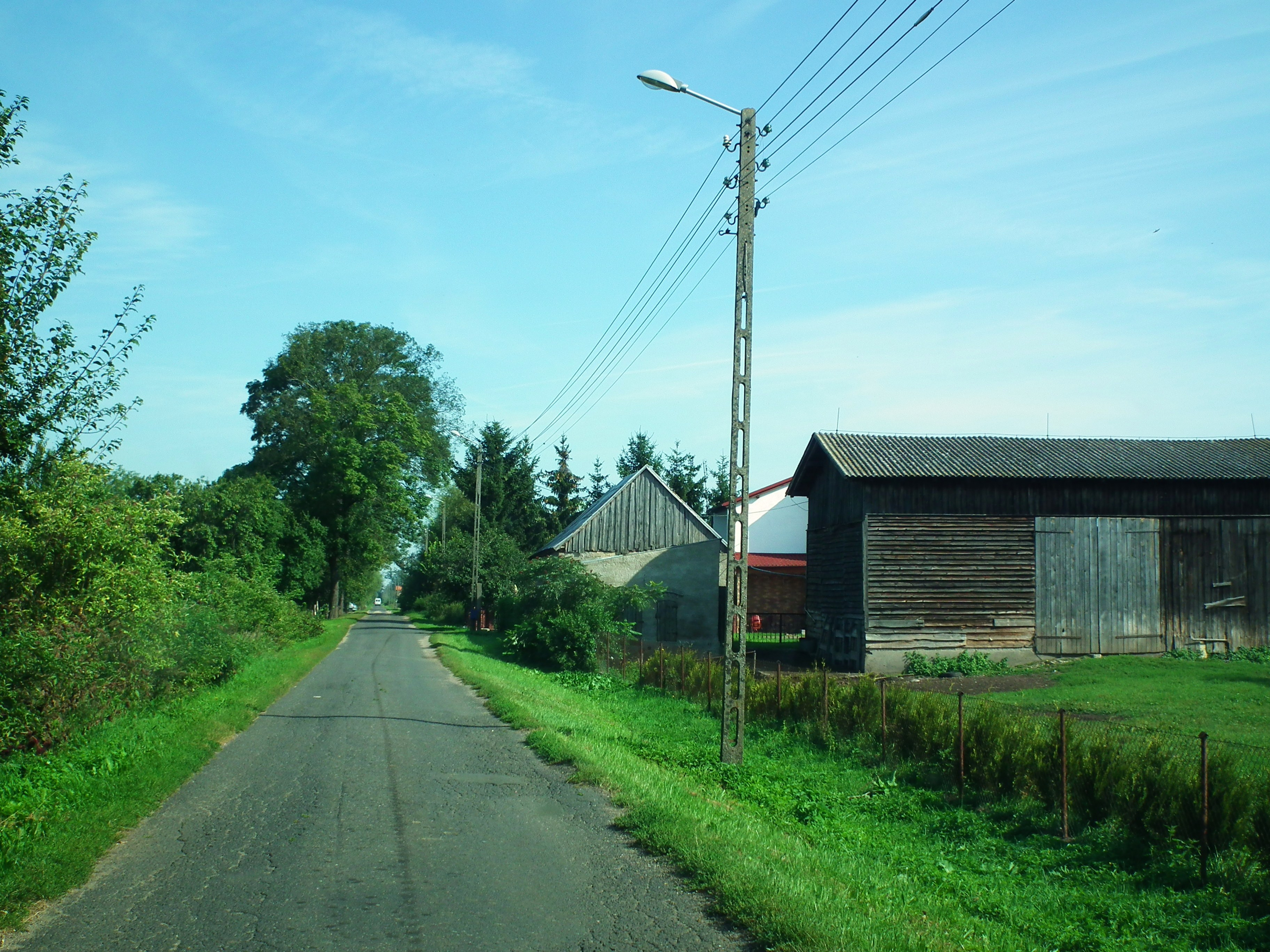 Jamno w pow. sulęcińskim.